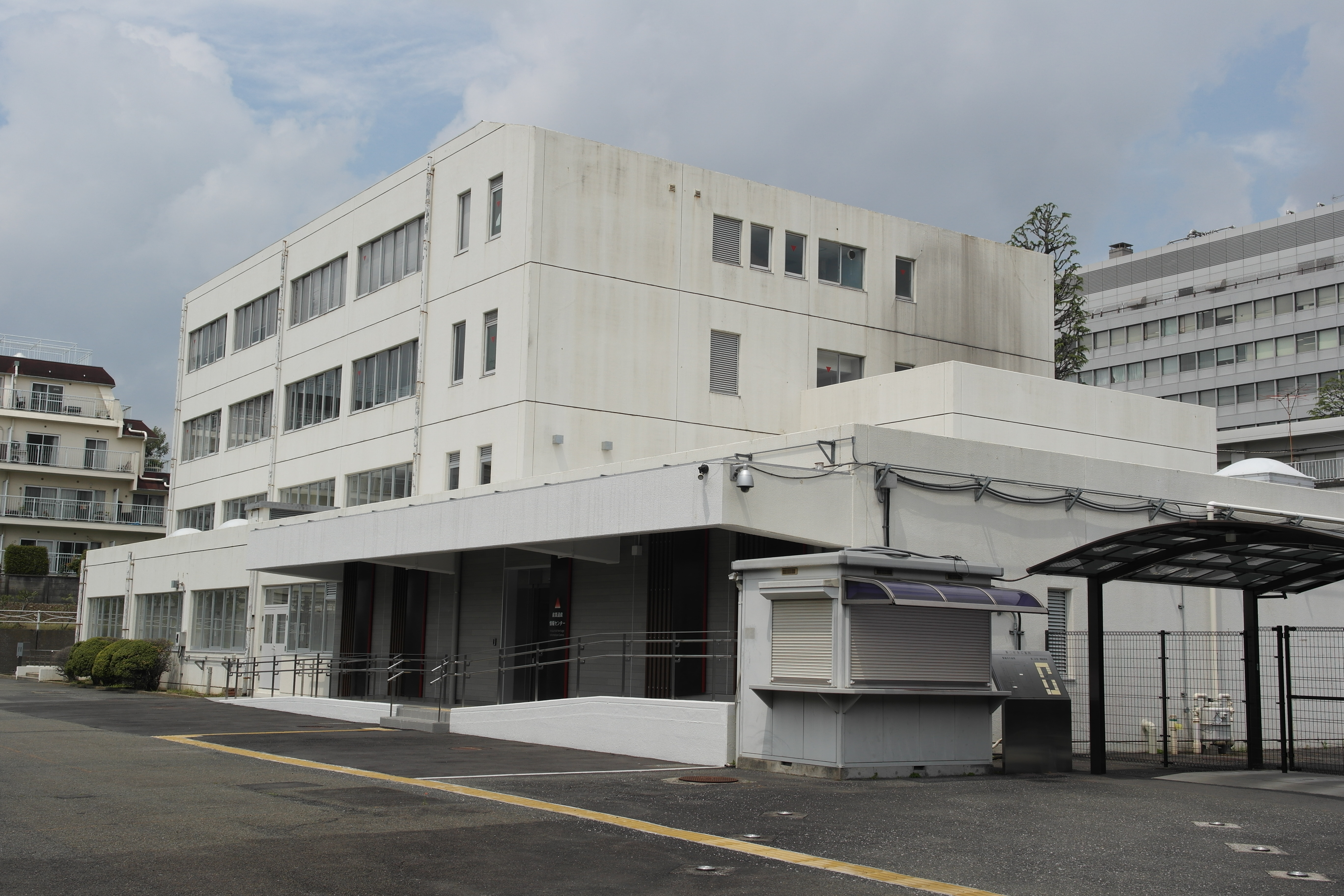 世界遺産「明治日本の産業遺産群」のガイダンス施設となる産業遺産情報センター（新宿区若松町の総務省第二庁舎統計研修所）。